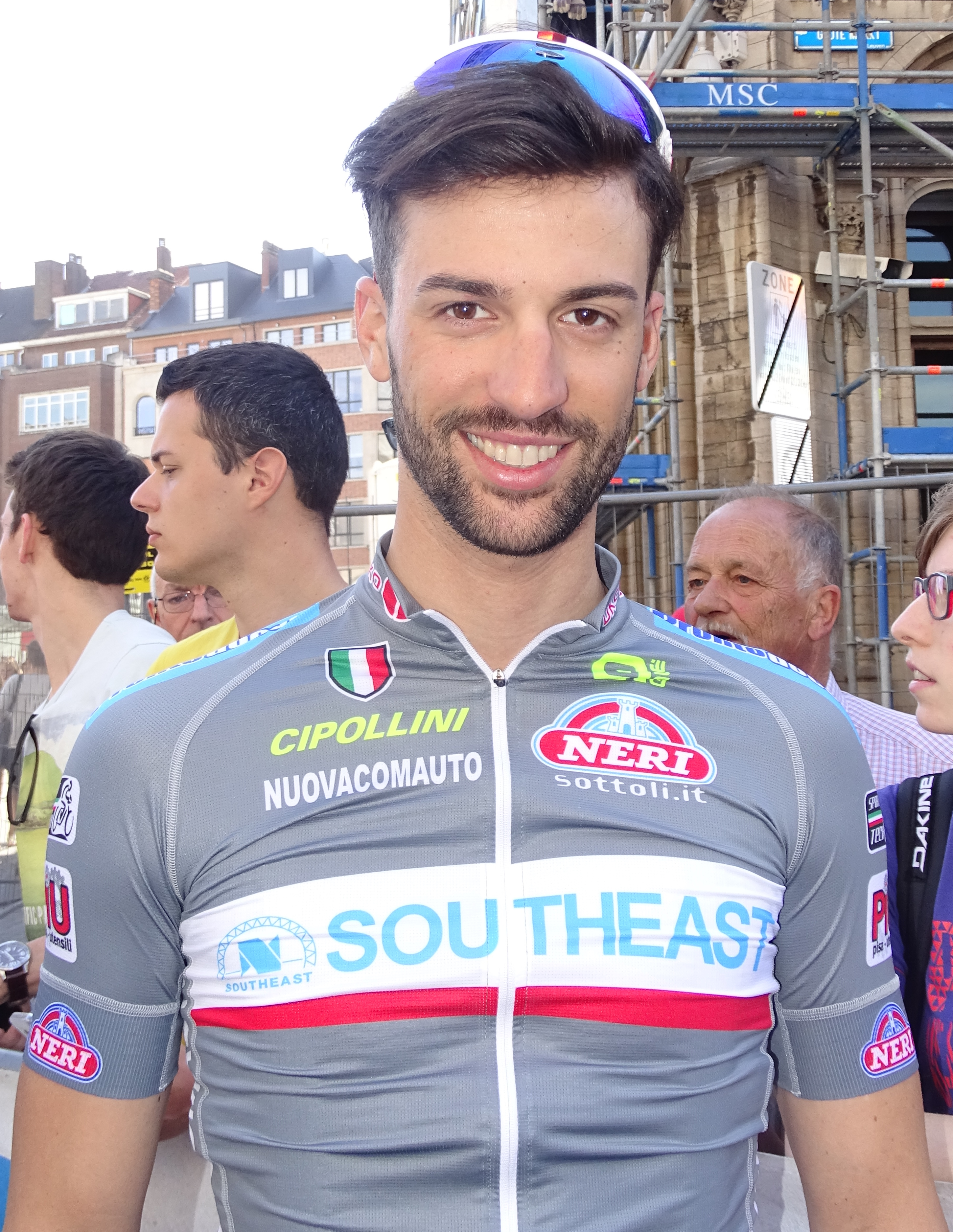 Reportage réalisé le mercredi 15 avril à l'occasion du départ de la Flèche brabançonne 2015 à Louvain, Belgique.